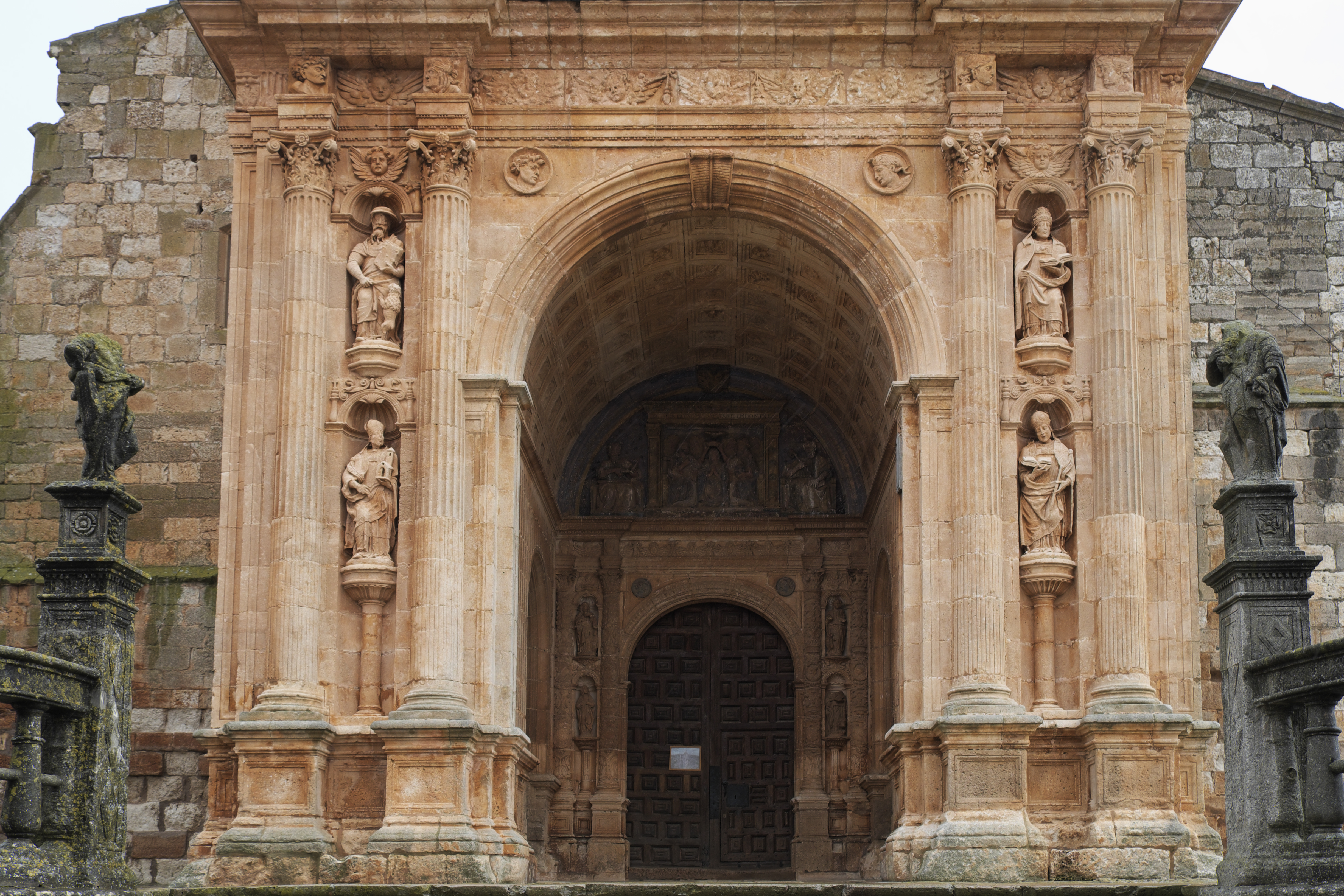 Kirche Asunción de Nuestra Señora (Mariä Himmelfahrt) in Santa María del Campo in der Provinz Burgos (Kastilien-León/Spanien), Hauptportal